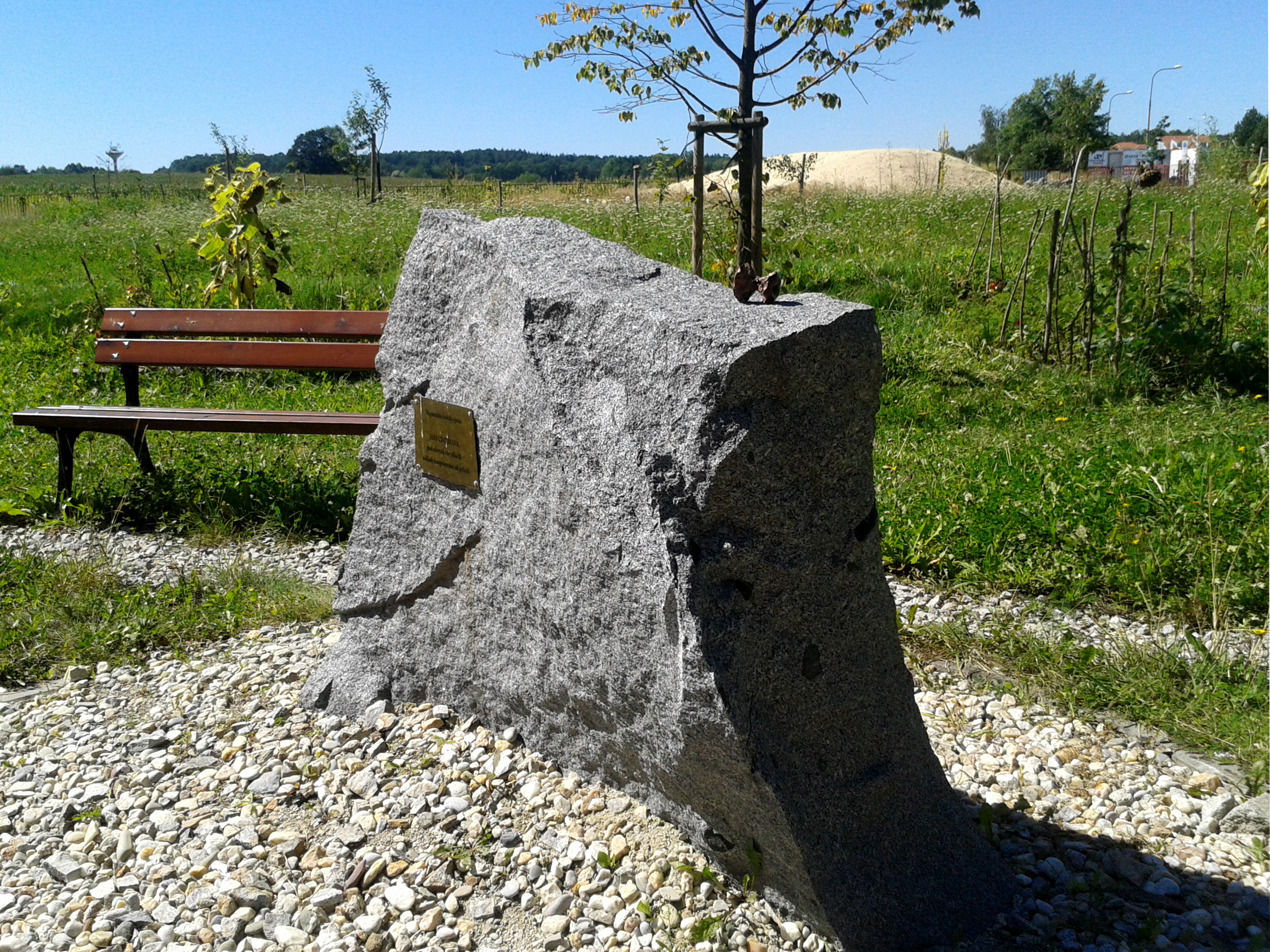 Ohryzek Járy Cimrmana, dílo sochaře Michala Trpáka umístěné v prostorách fakultní zahrady, je prvopočátkem ekologického kompostování na jihu Čech.